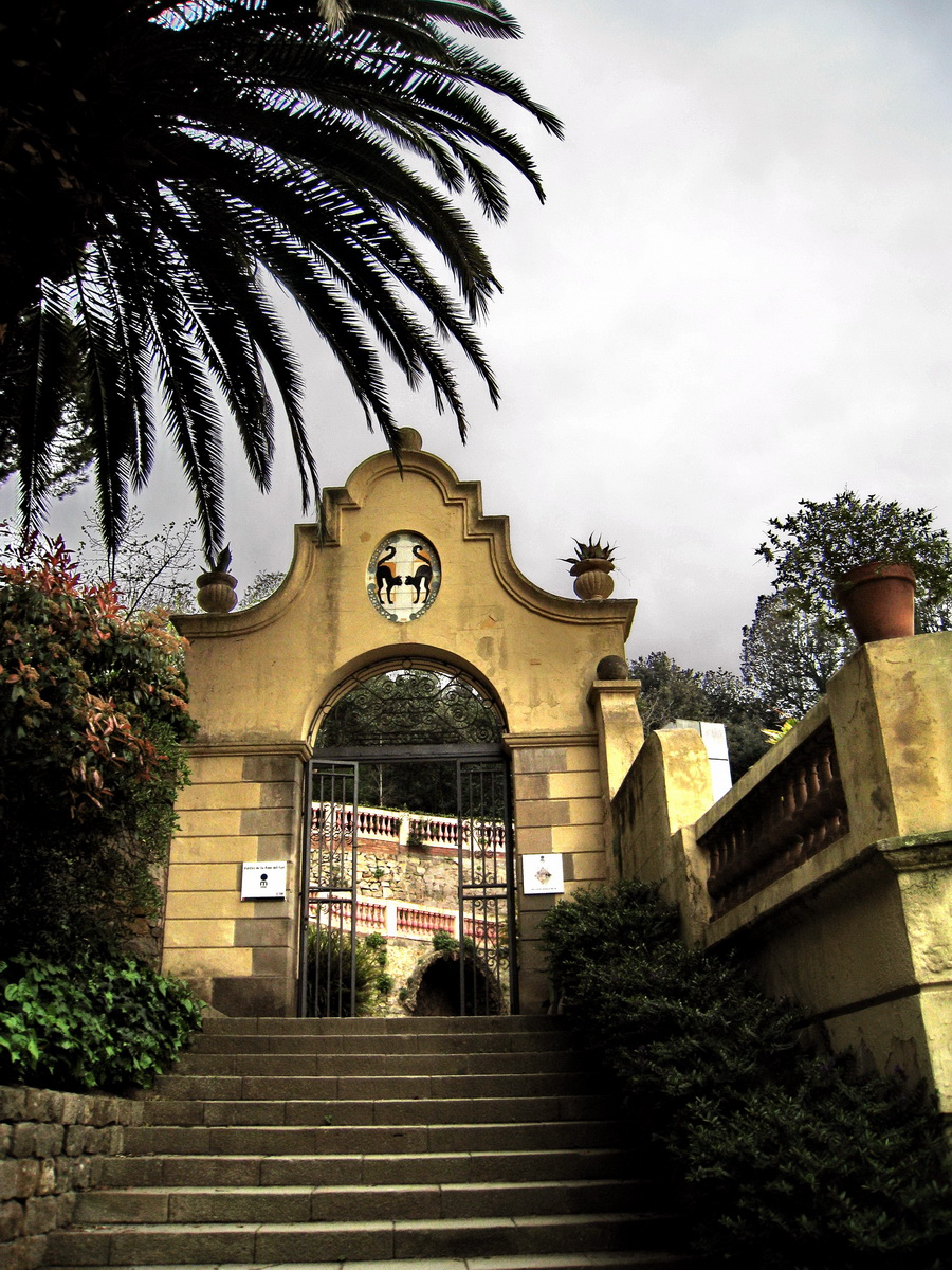 Portada d'accés a la Font del Gat dins dels jardins del mateix nom al parc de Montjuïc (Barcelona, Catalunya). Just davant hi ha un edifici noucentista que, junt amb la urbanització del jardins i la portada de la imatge són obra de Josep Puig i Cadafalch (1918).